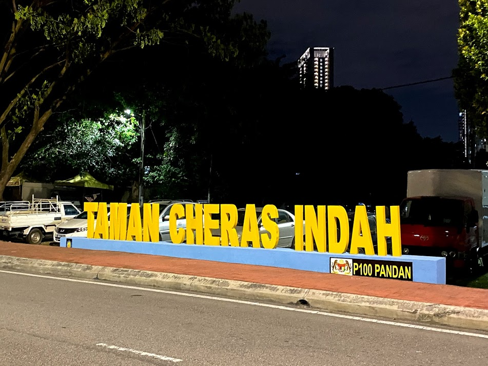 蕉賴各住宅區典型街景